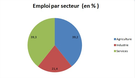 Emploi par secteur de l'économie marocaine en 2014